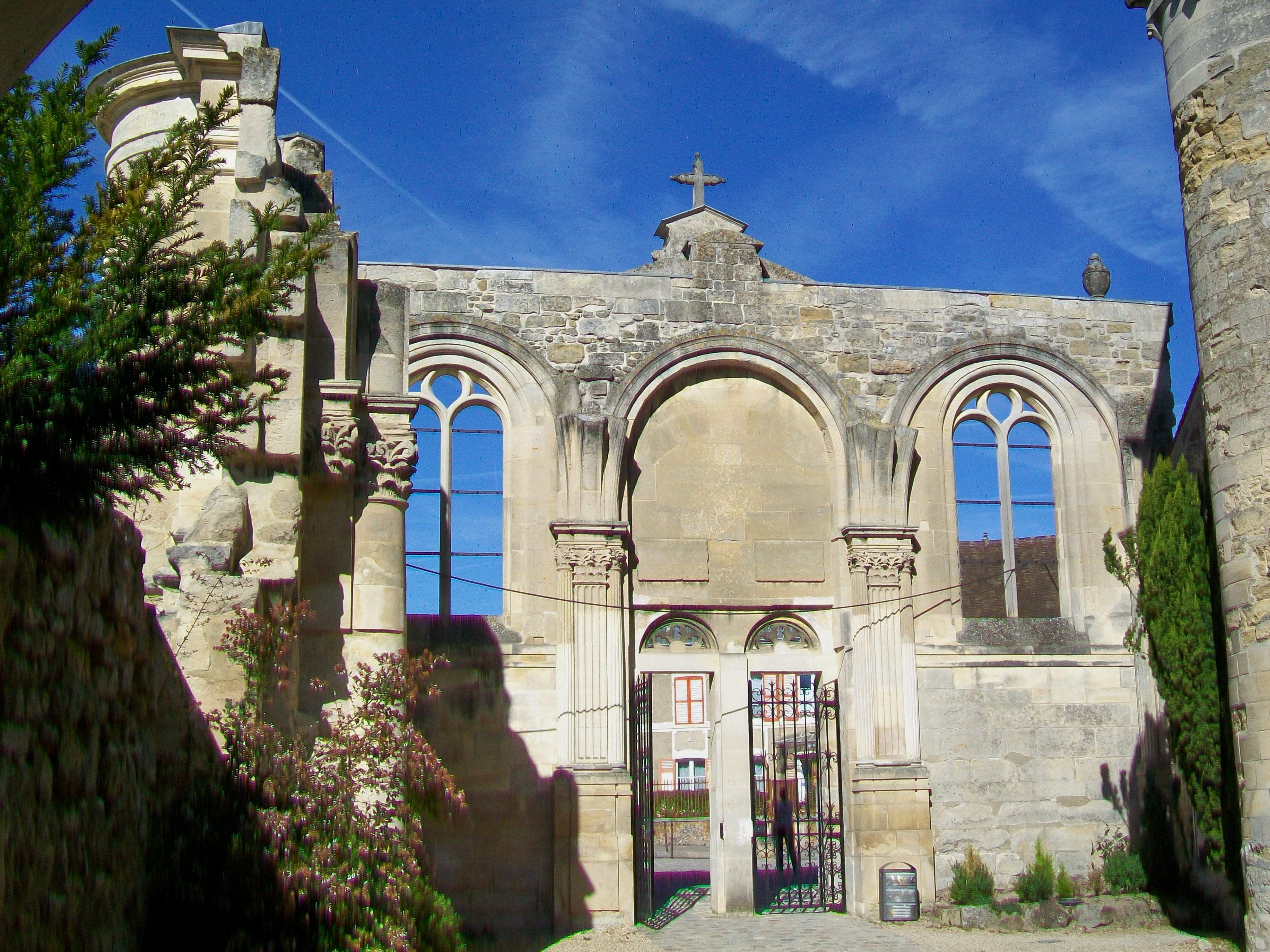 Vue intérieure de la façade Renaissance nord.